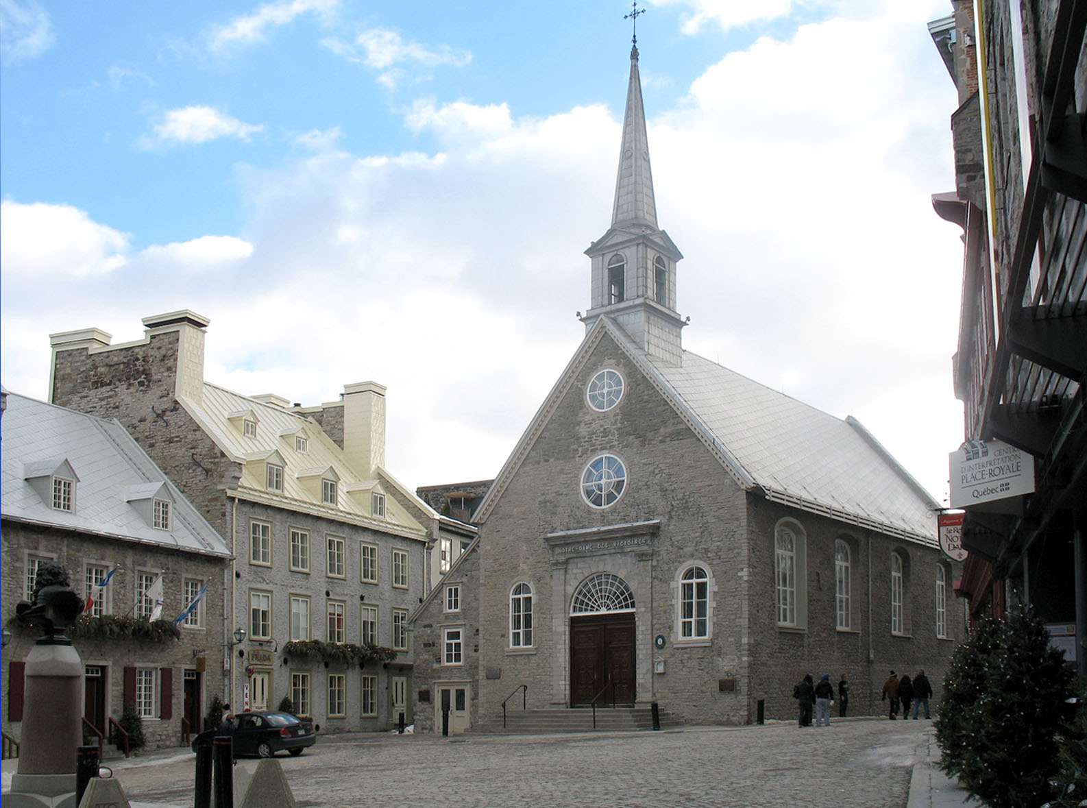 Place Royale, Québec, Canada